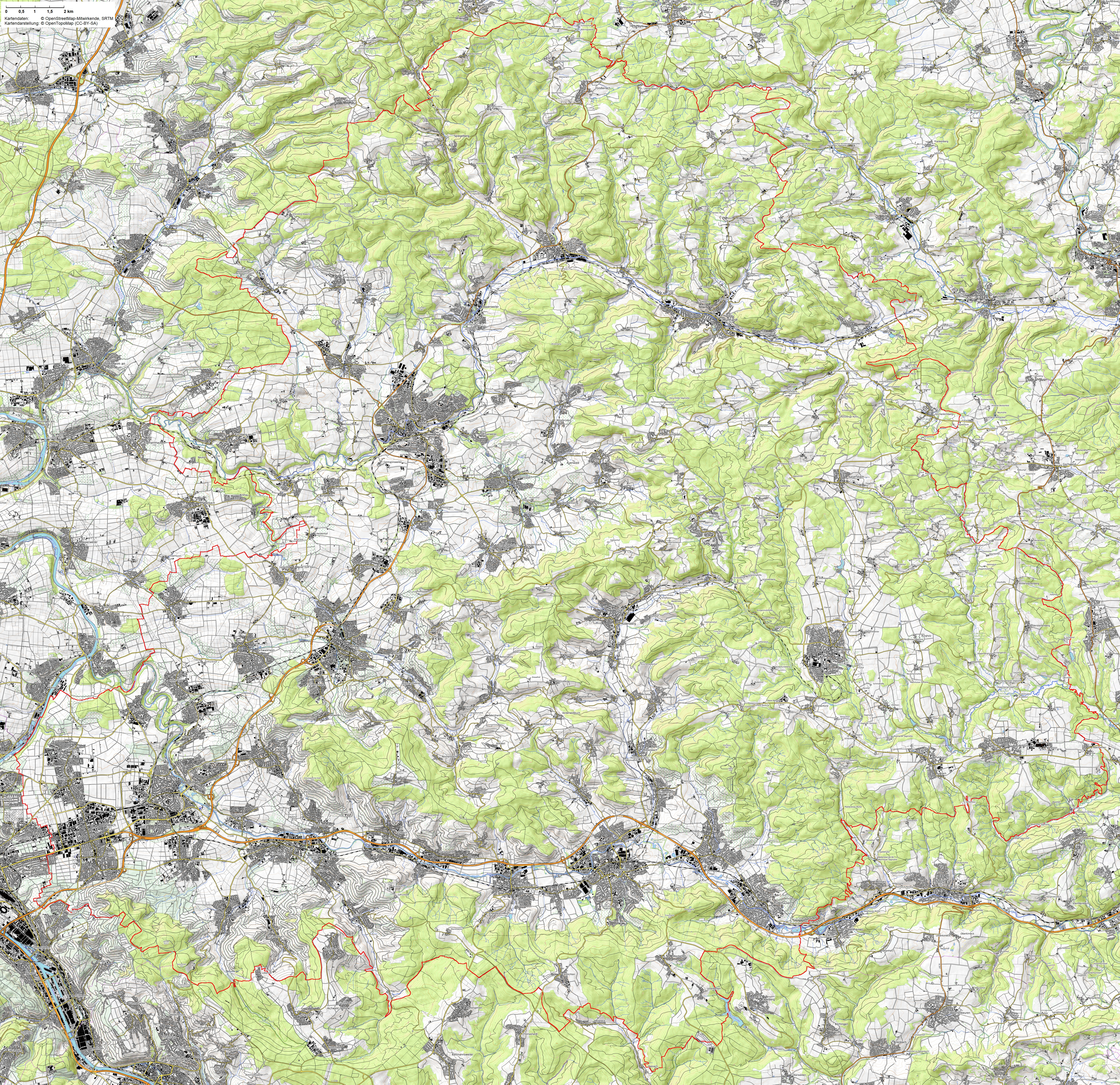 ... auf der Basis von Kartendaten: (C) OpenStreetMap-Mitwirkende, SRTM Kartendarstellung: (C) OpenTopoMap (CC-BY-SA)